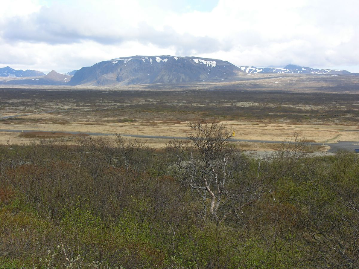 Þingvellir, Iceland